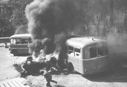 Trovata in Valle Giulia istantanea dello scontro (1968)